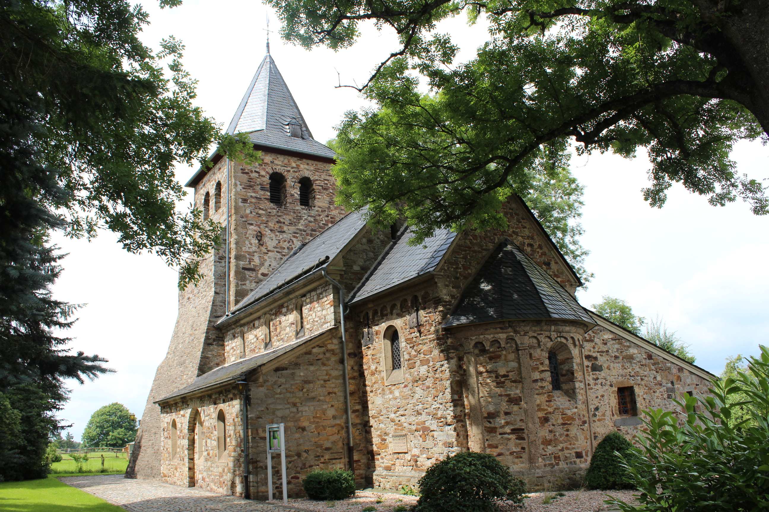 Kirche in Kircheib, Westerwald